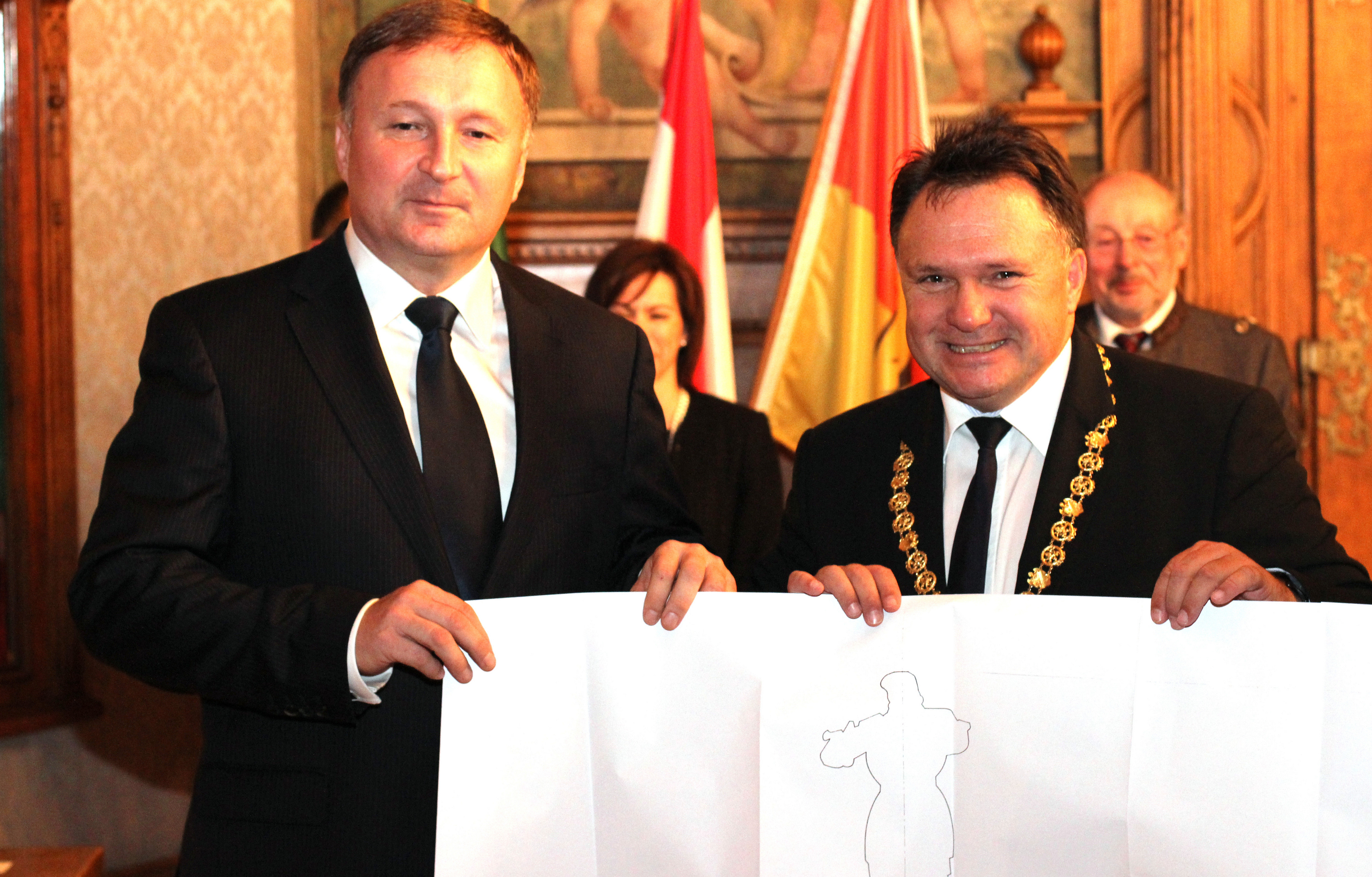 Am 29. Oktober 2015 überreichte der Kaufbeurer Oberbürgermeister Stefan Bosse dem Stadtpräsidenten Petr Beitl aus Jablonec Kopien der Baupläne für den Rüdiger-Brunnen.